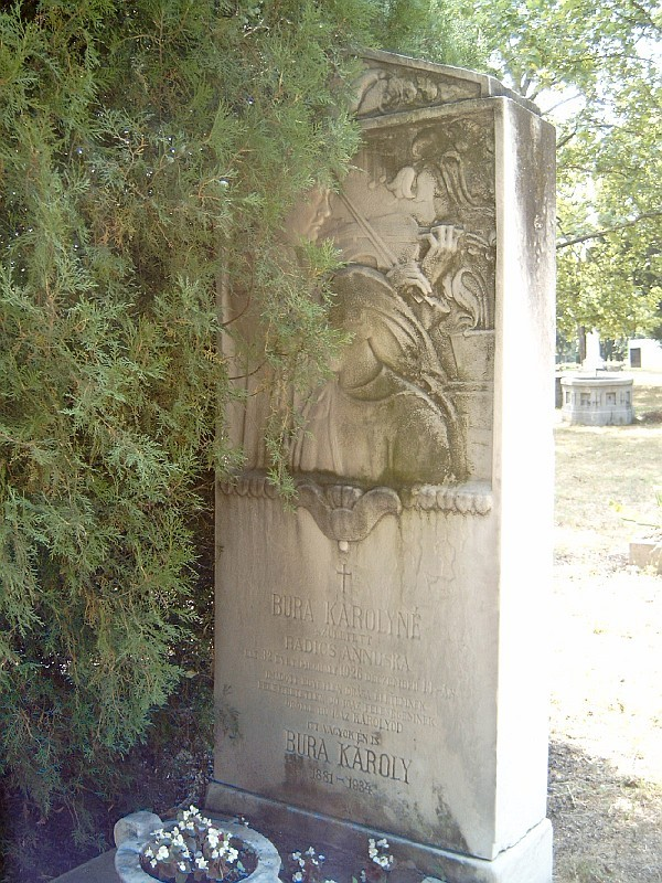 Bura Károly (Debrecen, 1881 – Budapest, 1934. június 1.) cigányprímás, Bura Sándor bátyjának sírja Budapesten. Kerepesi temető: 11-1/a-19